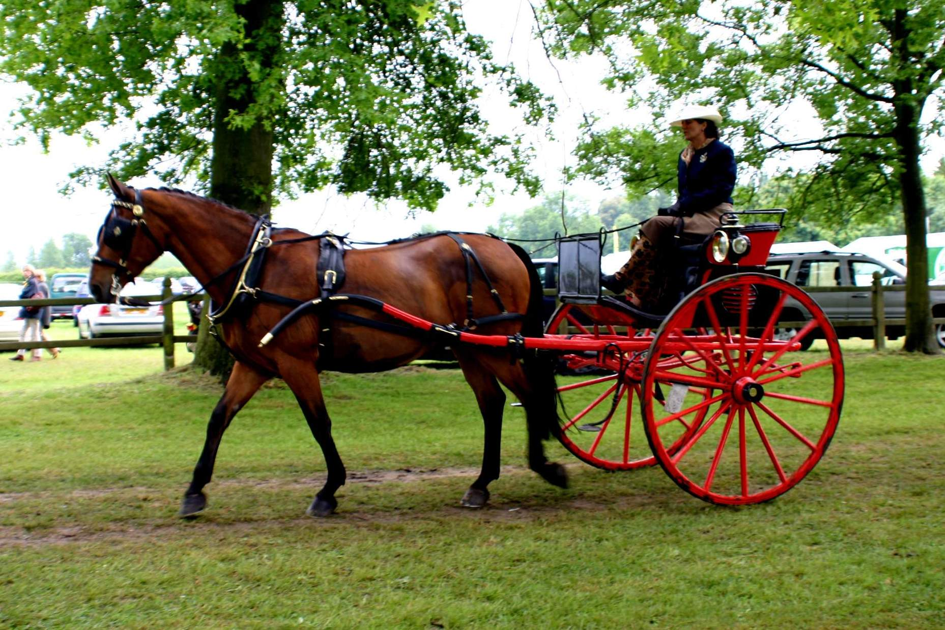 Attelage par un Auteur: Beideler René